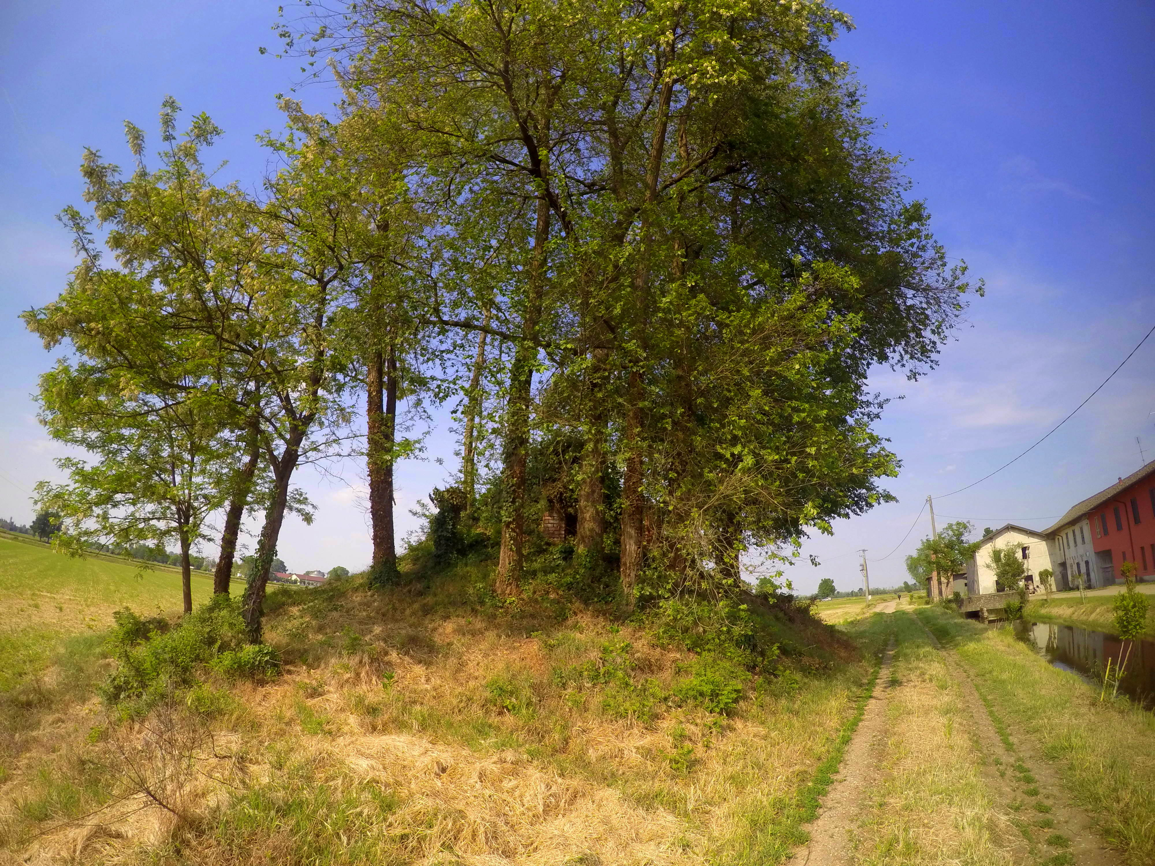 Albairate - Cascina Tosa